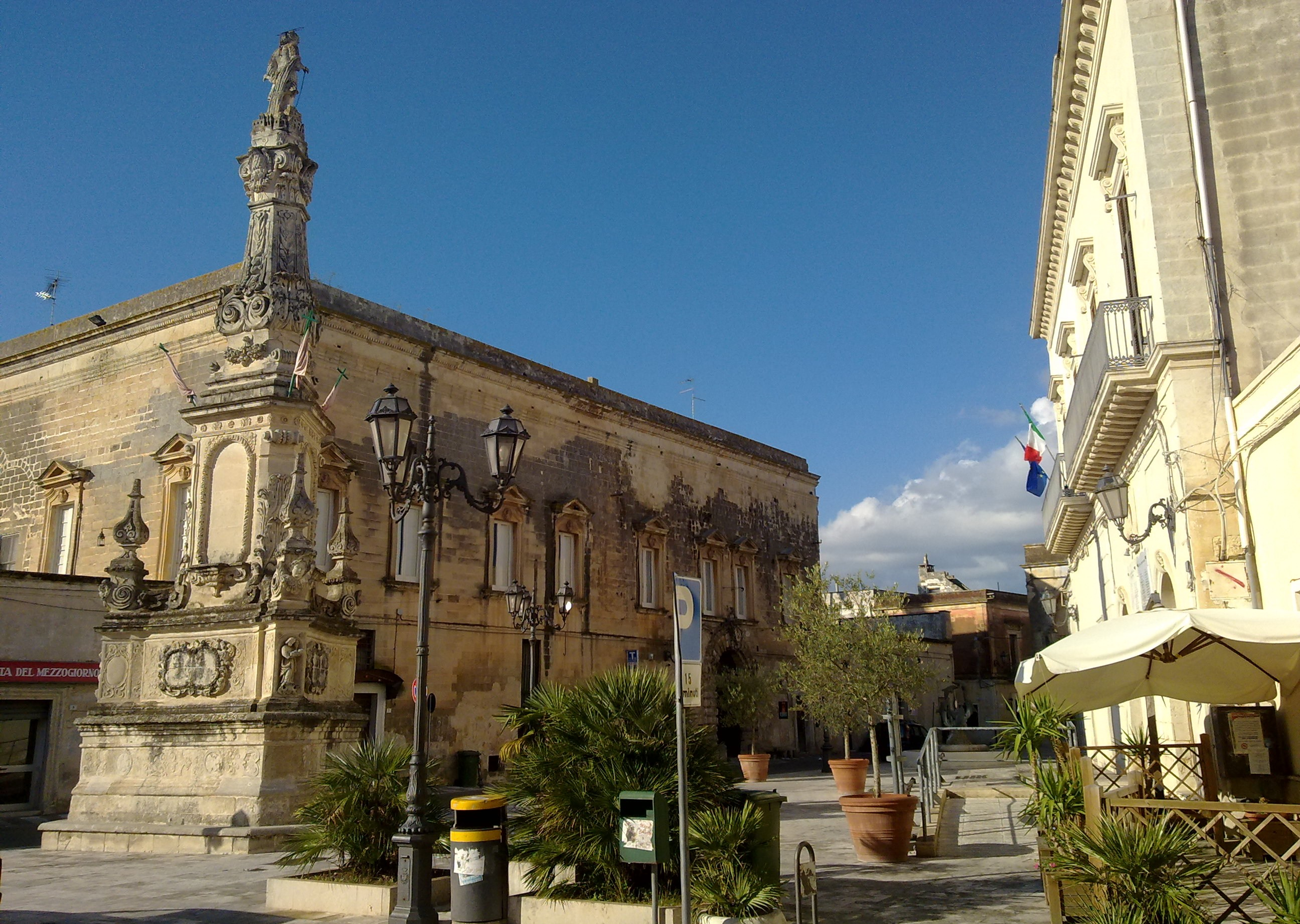 Piazza Lequile, Lecce